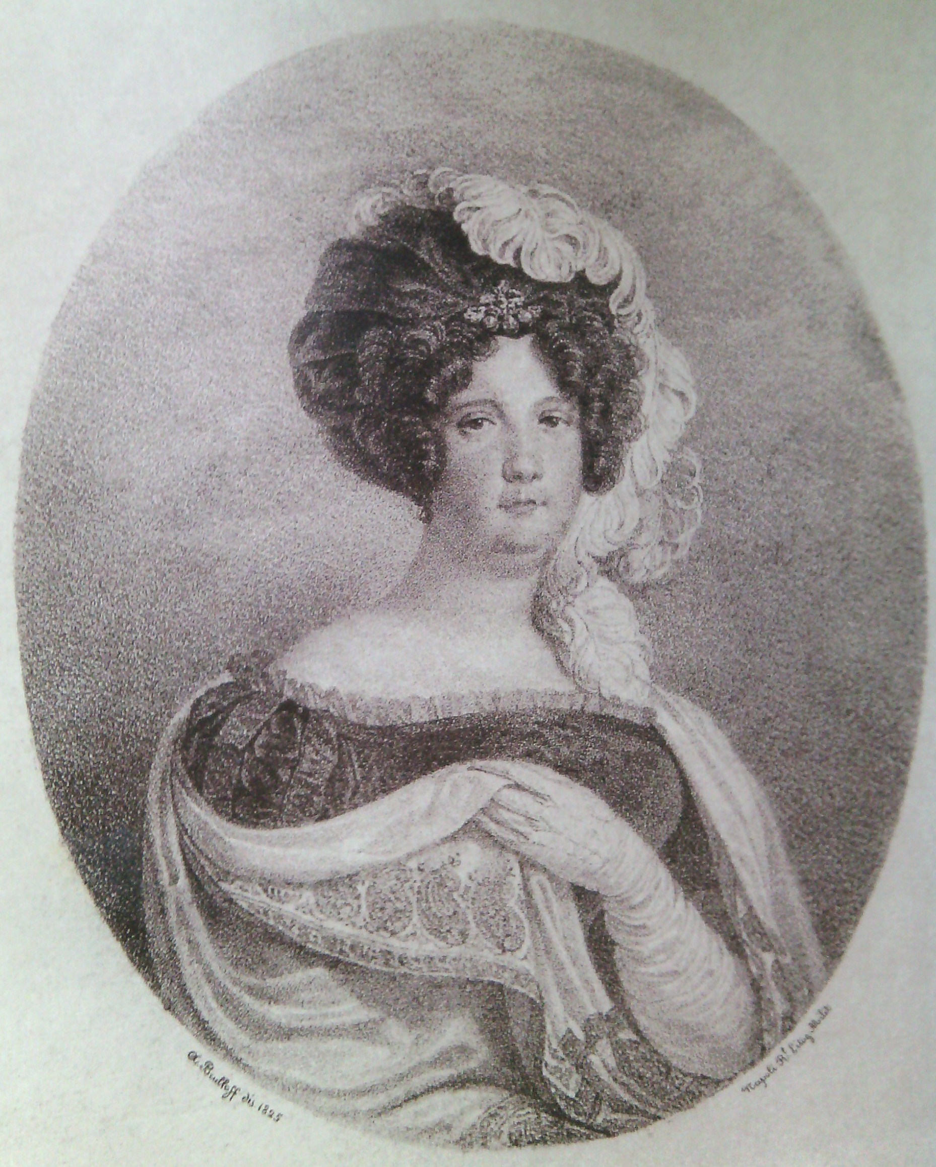 Графиня Мария Дмитриевна Нессельроде, урождённая Гурьева (1786—1849)